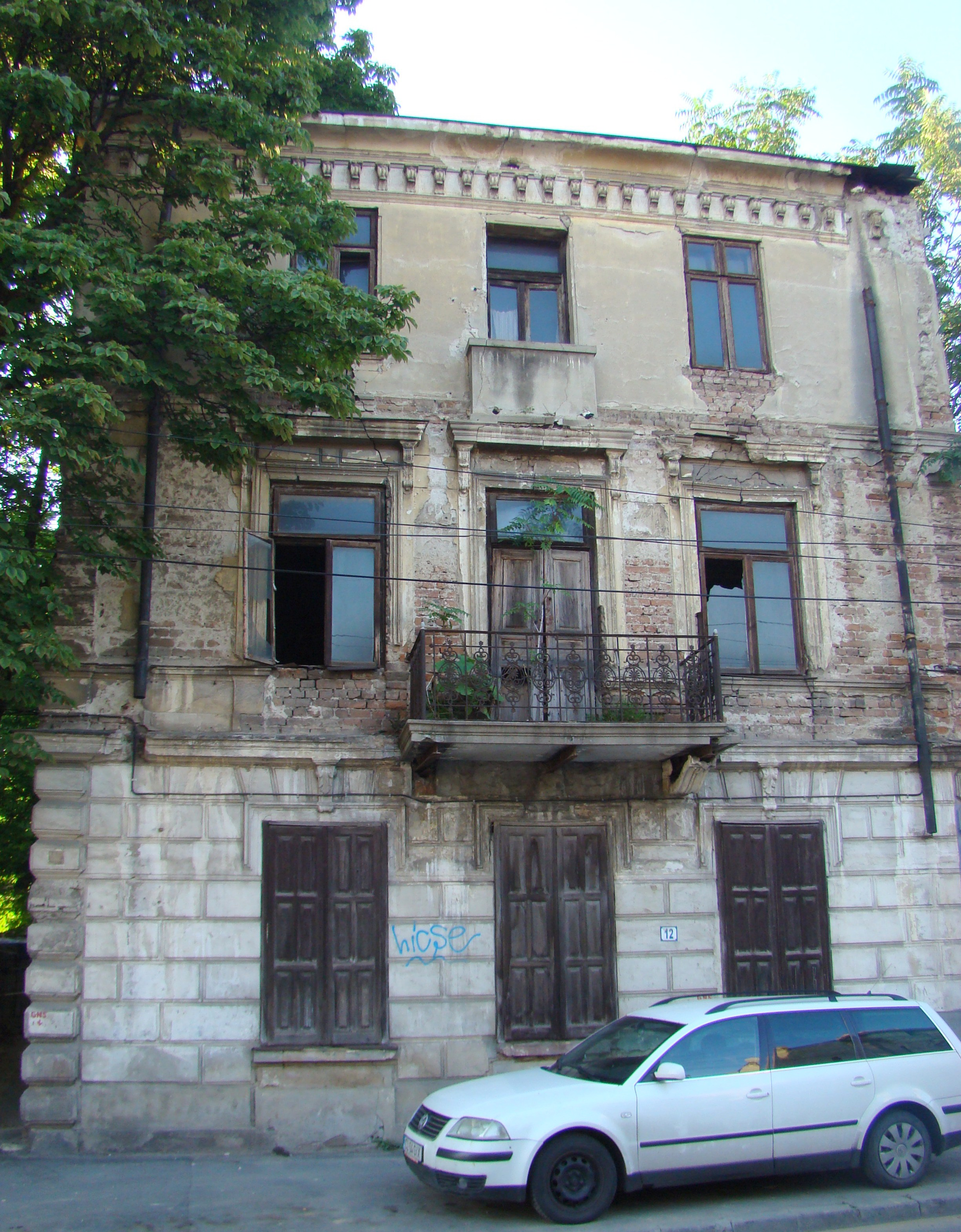 Clădire monument istoric, str. Mircea Vulcănescu, nr.12